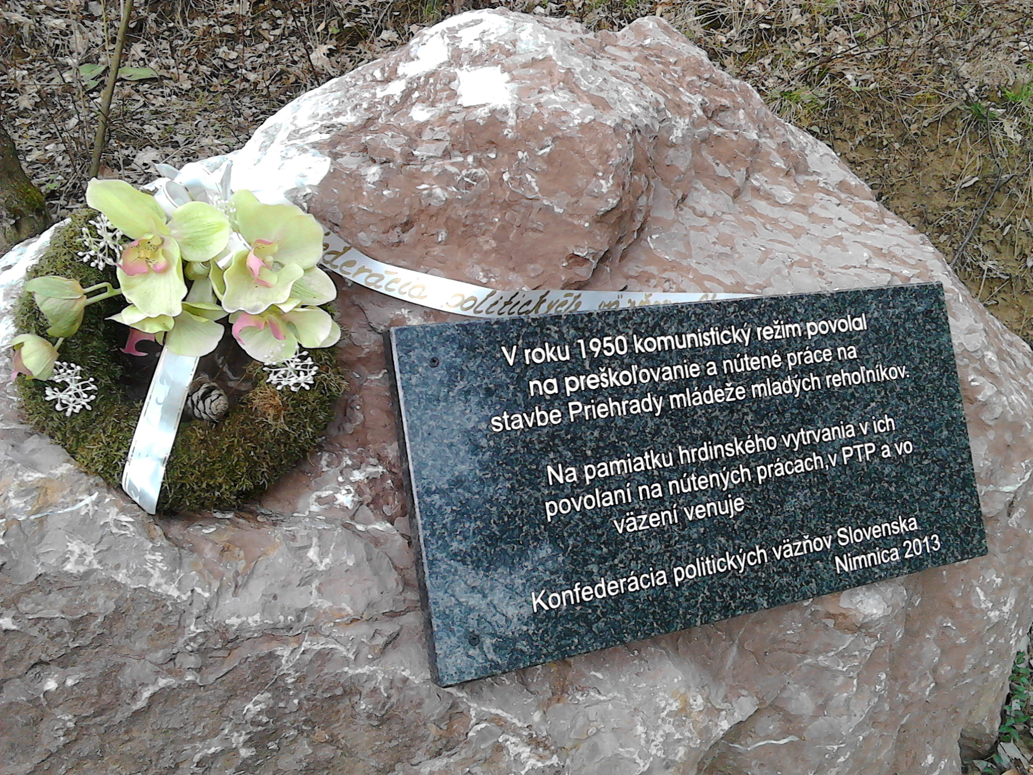 Pamätná tabuľa rehoľníkom na nútených prácach pri stavbe Priehrady mládeže